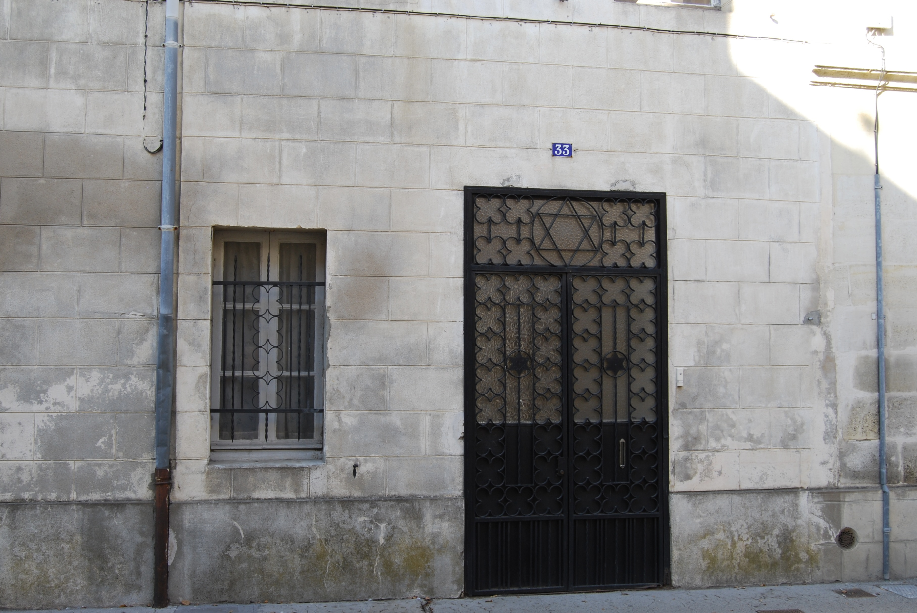 Synagogue de Libourne, (Inscrit, 1995) .